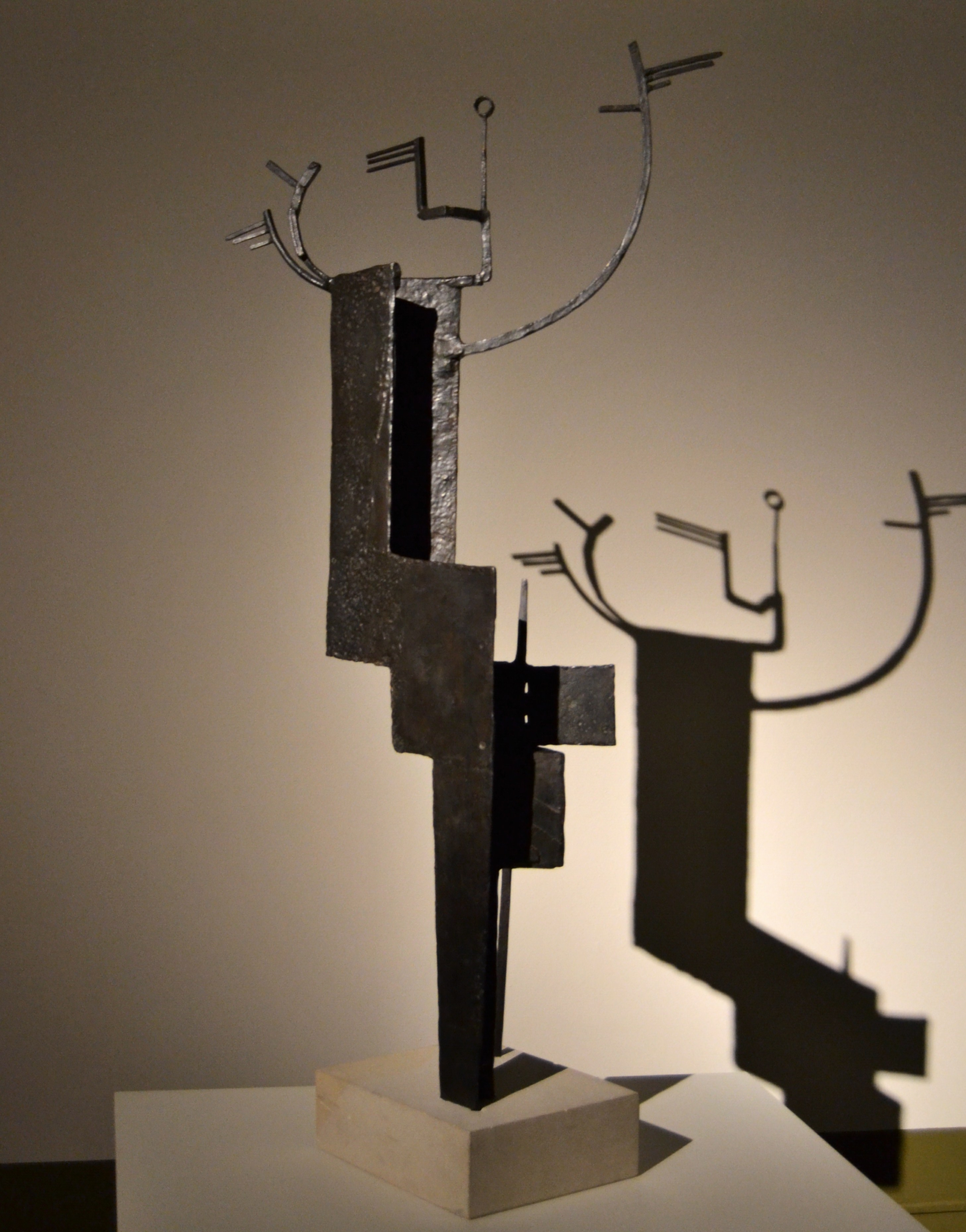 Daphné, Julio González, bronze fos, 140 x 66 x 29 cm. 1937, Institut Valencià d'Art Modern.